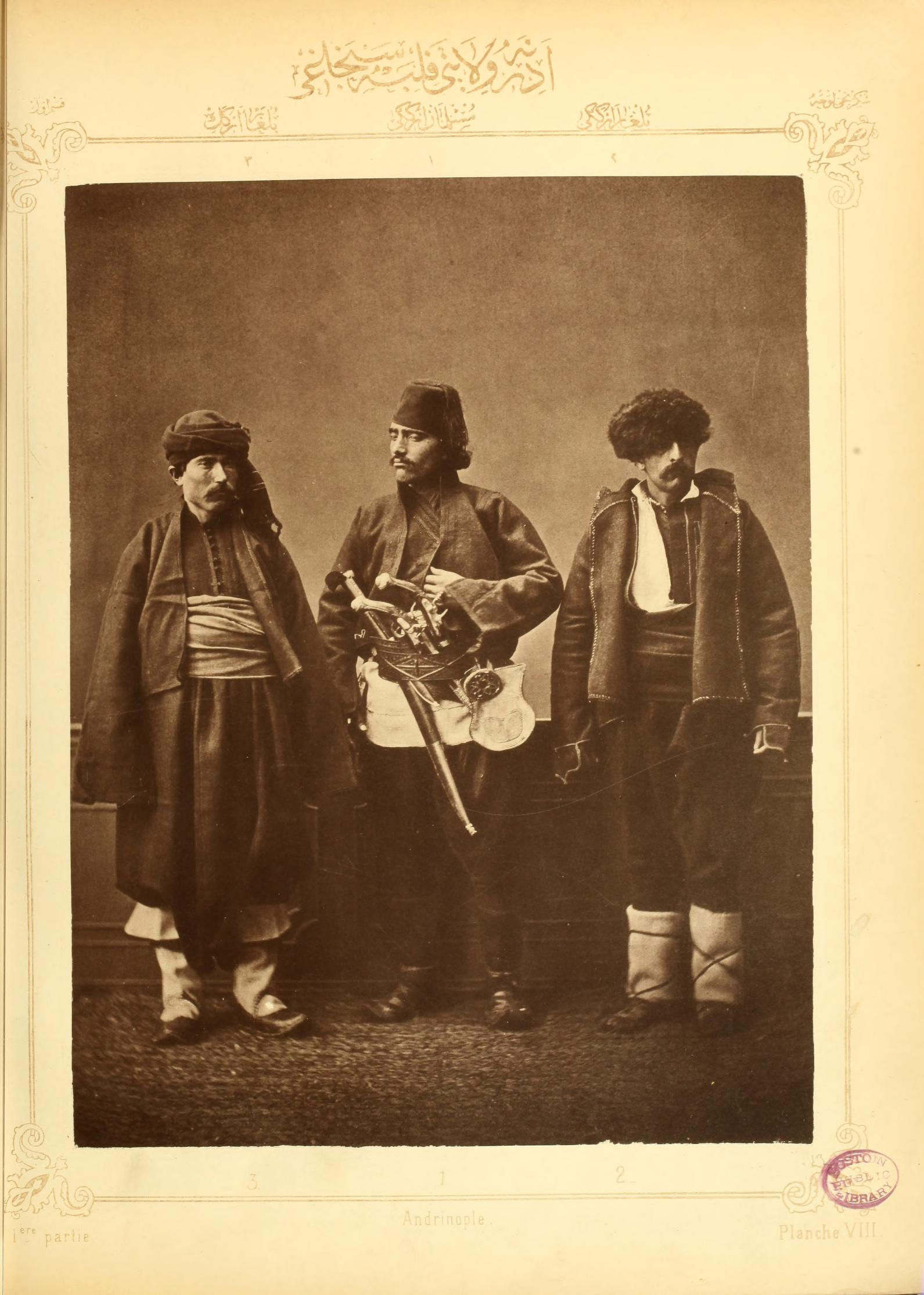 VILAYET D'ÈDIRNÈ (andrinople) PLANCHE VIII: Cavalier musulman de Fèlibè Bulgare de Koyountèpè Bulgare de Ah'i Tchèlebi